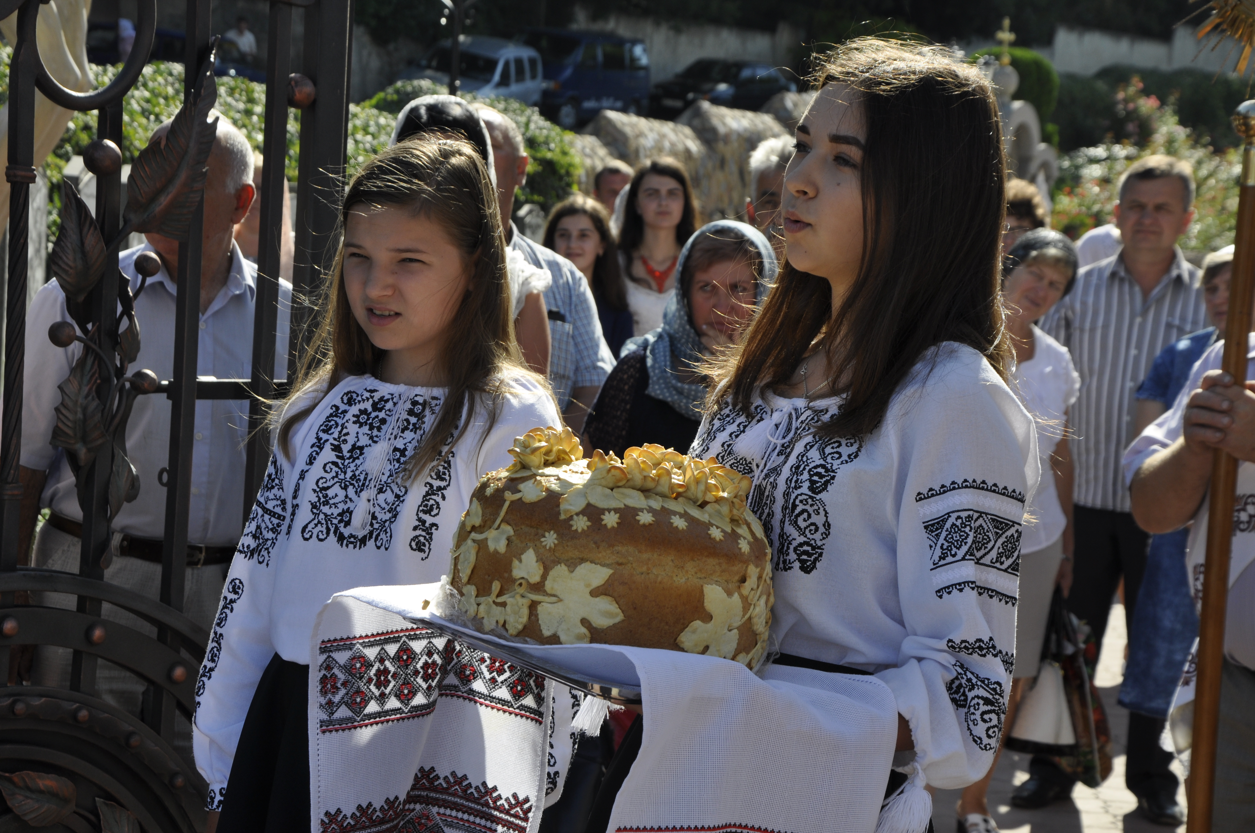 Проща до Чорткова